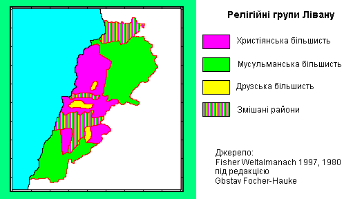 Контроль території Лівану у 1976.